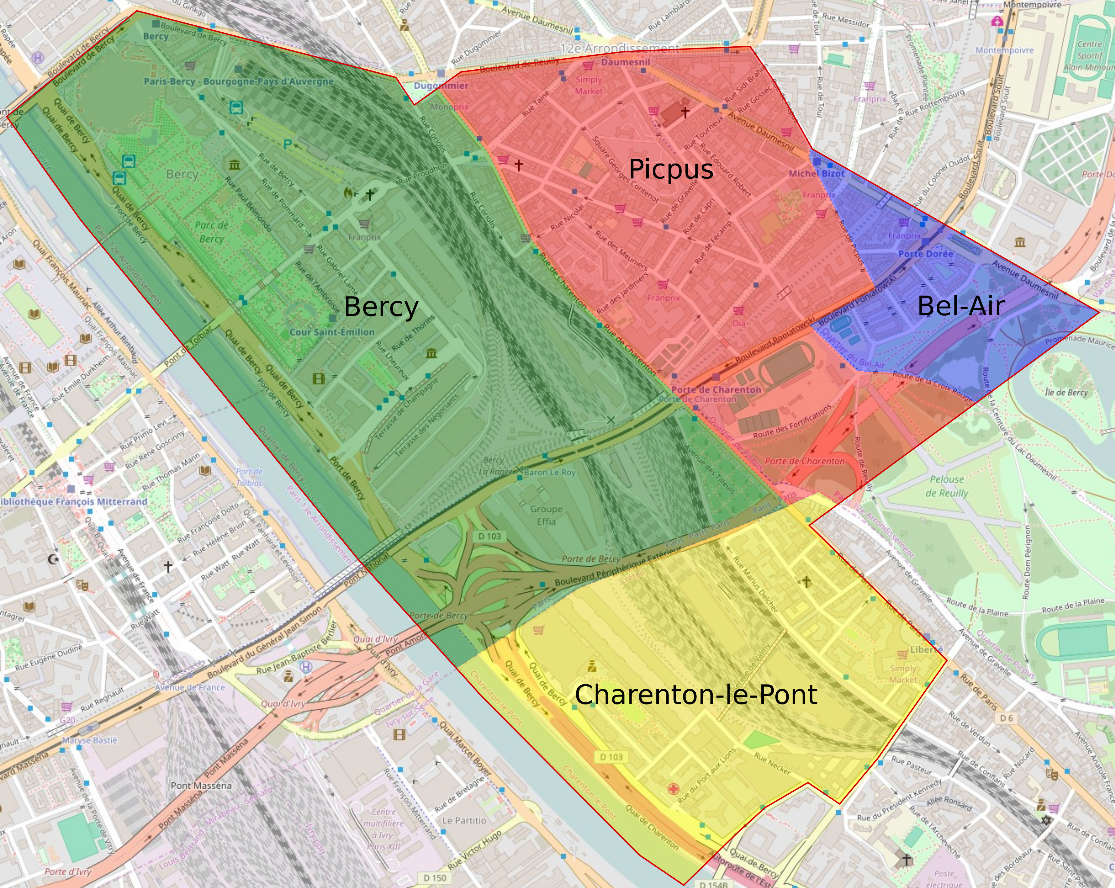 Limites de l'ancienne commune de Bercy, avant son annexion à Paris en 1859, reportées sur un plan moderne et avec la répartition du territoire communale dans les communes et quartiers parisiens.